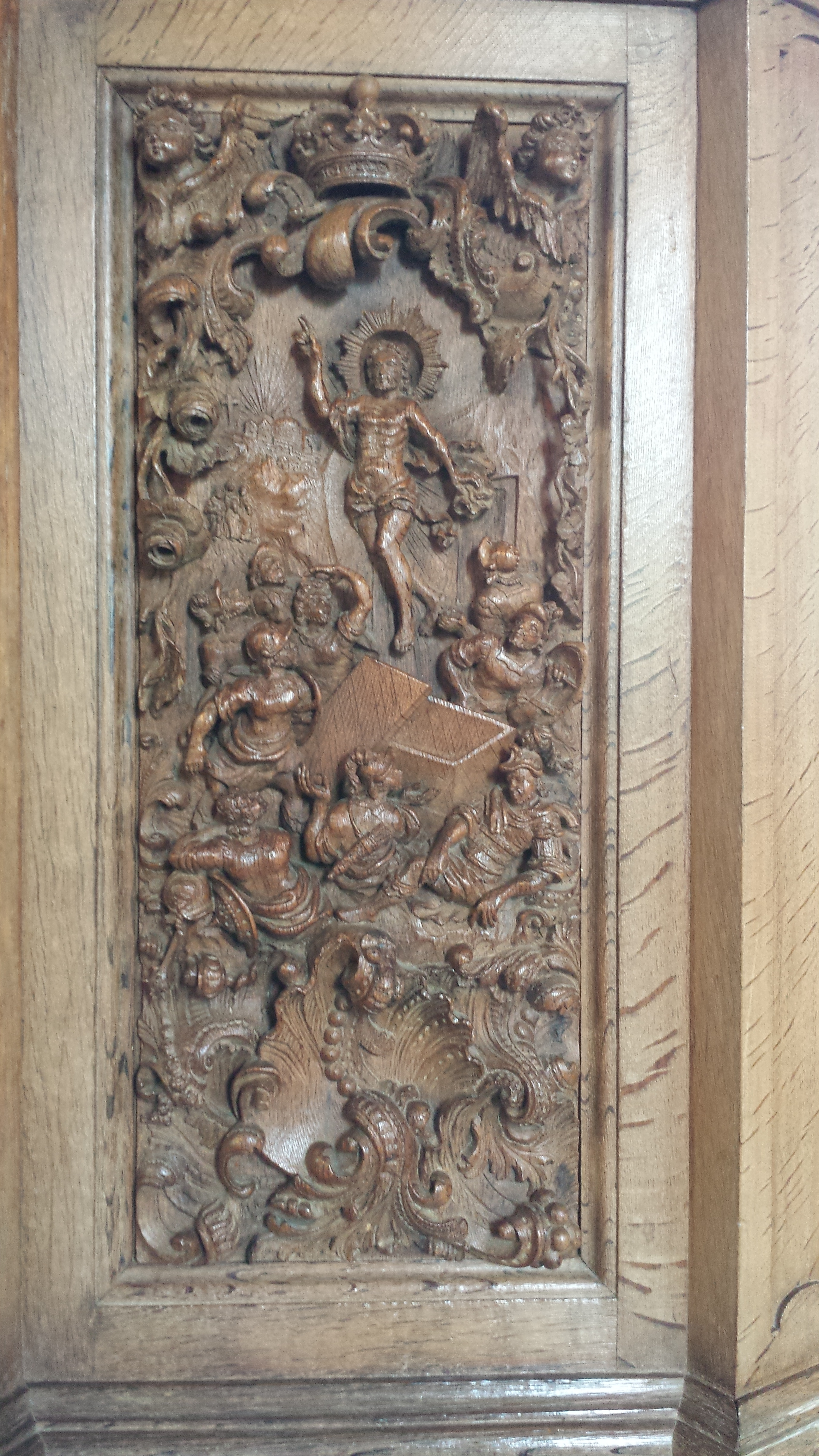 Paneel op de preekstoel van de kerk te Longerhouw, waarop de opstanding van Jezus is afgebeeld. Gemaakt omstreeks 1757 door Gerben Jelles Nauta